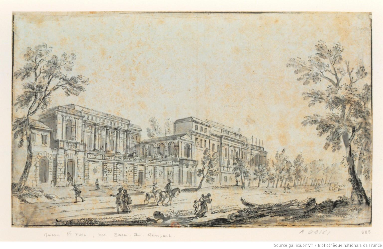 Hôtel Radix de Sainte-Foix, rue Basse-du-Rempart, aujourd'hui boulevard des Capucines. Au fond, l'hôtel de Montmorency, à l'angle de la rue de la Chaussée d'Antin.